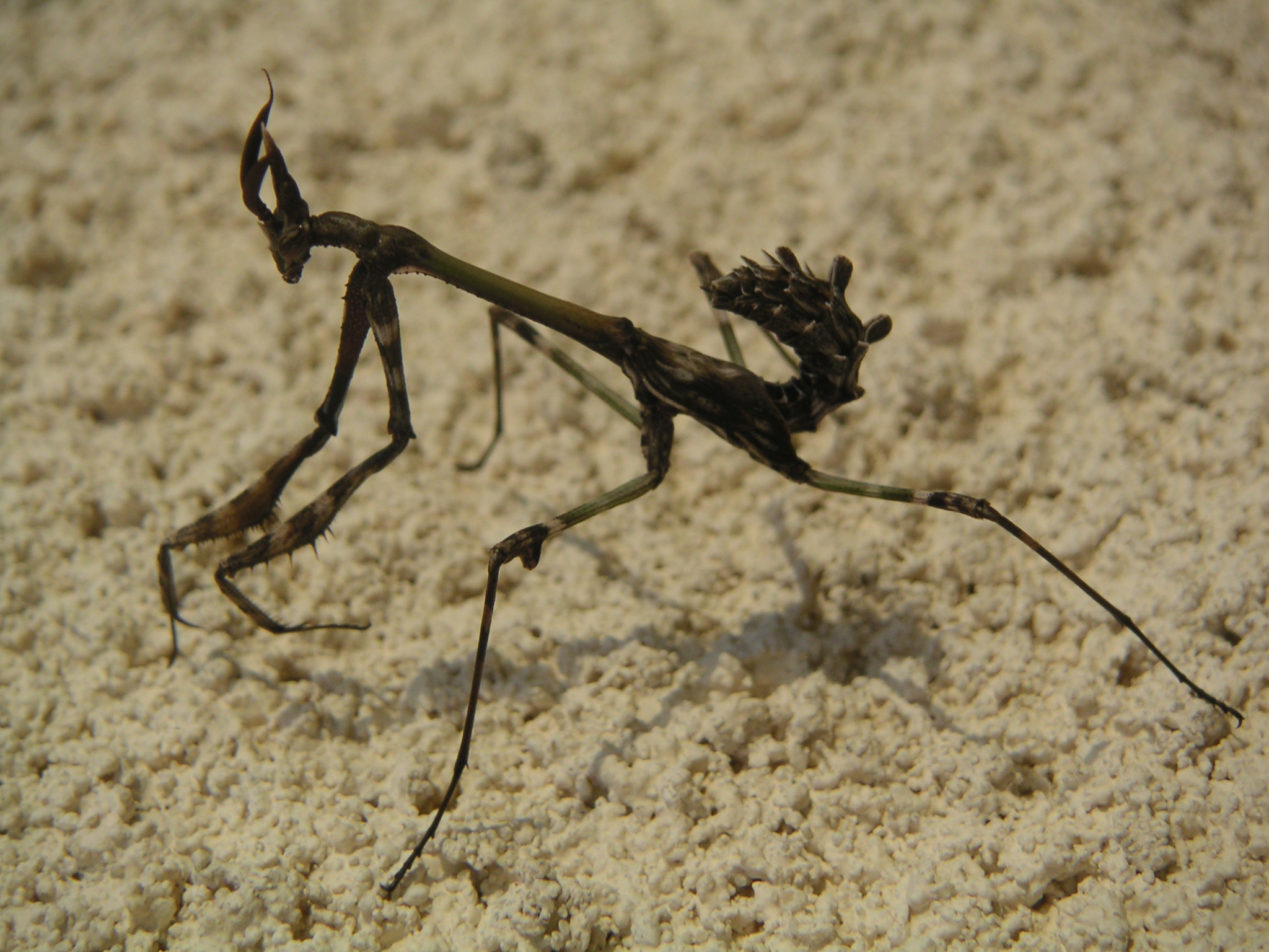 Empuse (Empusa pennata) observée dans le département du Lot - France - à proximité de Cahors, au cours de l'été 2005.